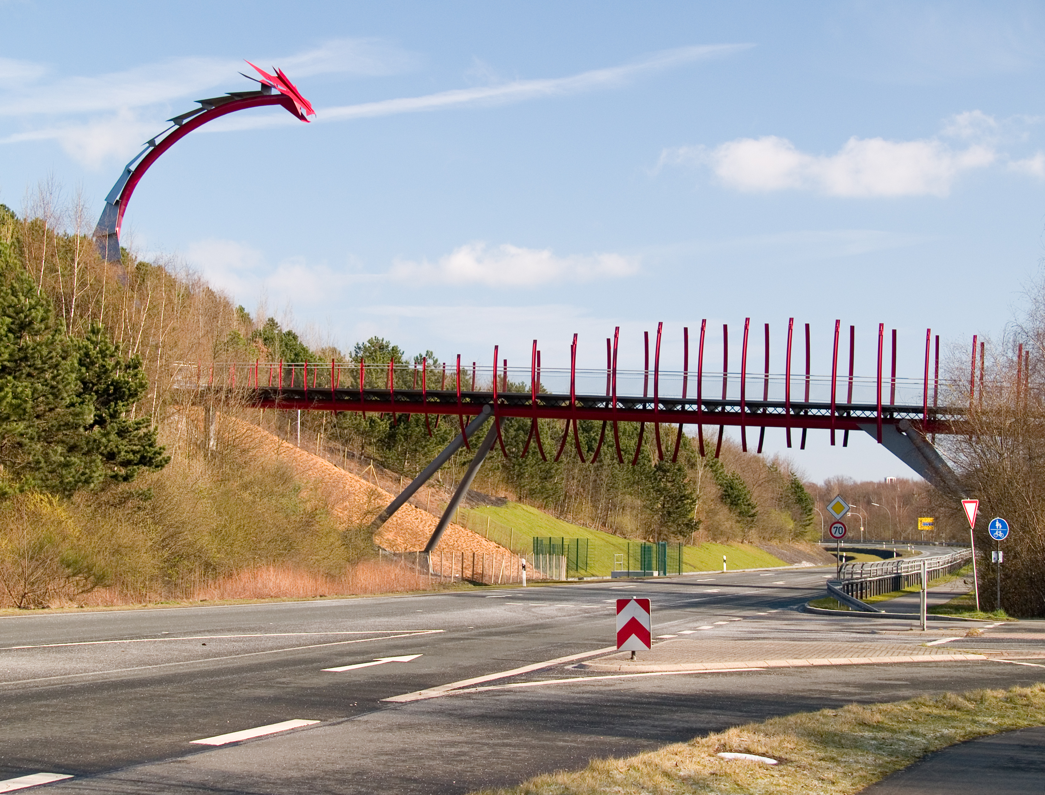 Die Drachenbrücke an der Halde Hoheward in Herten - im Profil